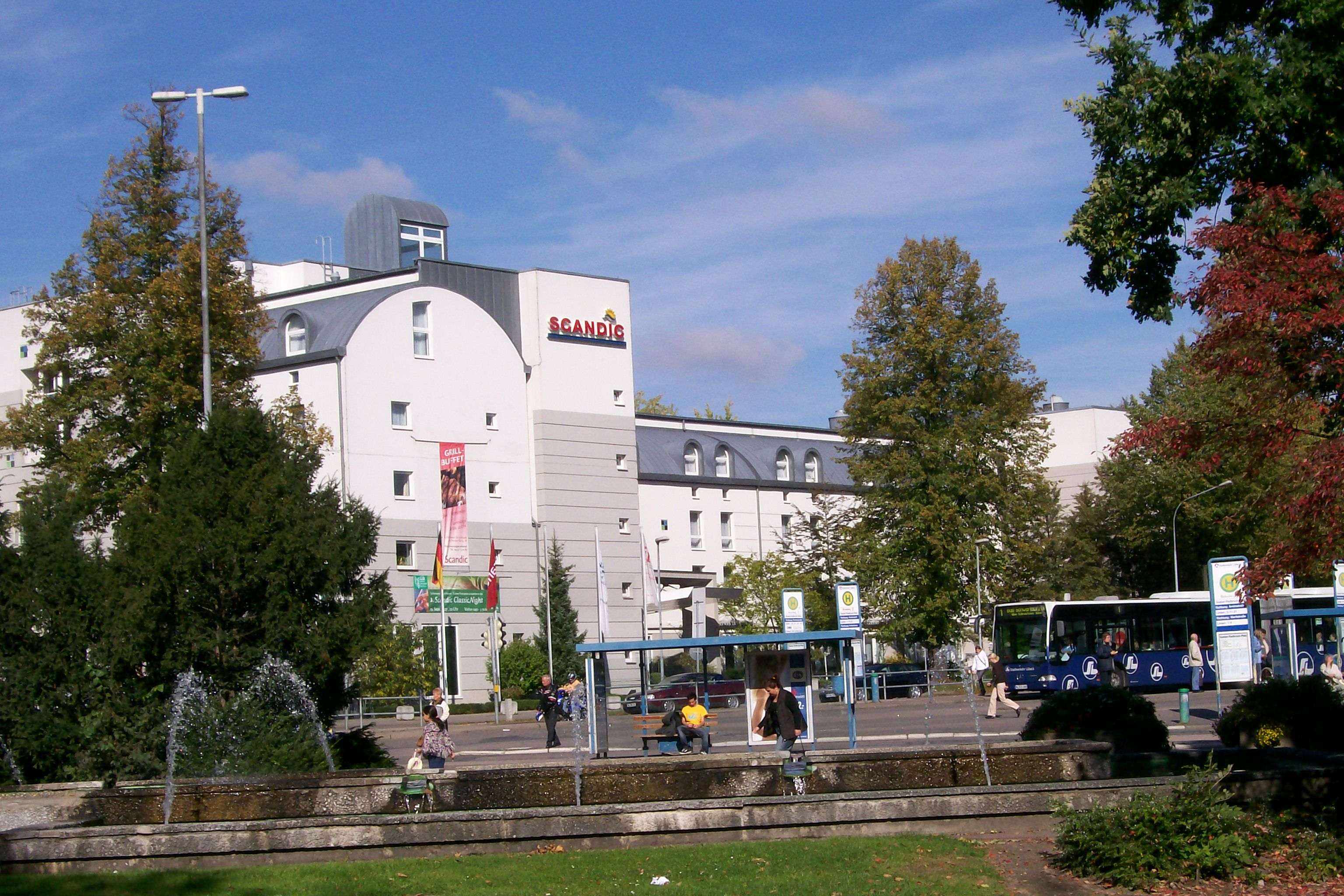 Das Burgfeld in Lübeck, amtlich: Gustav-Radbruch-Platz, Der Brunnen wurde im September 2016 abgebrochen.